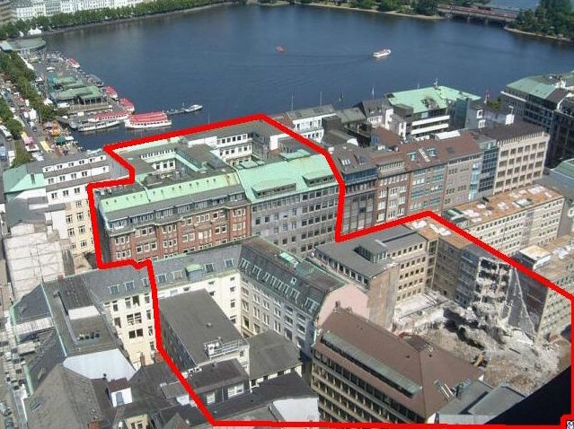 Der Abbruchbereich der Europapassage in Hamburg-Altstadt, von St. Petri aus photographiert.